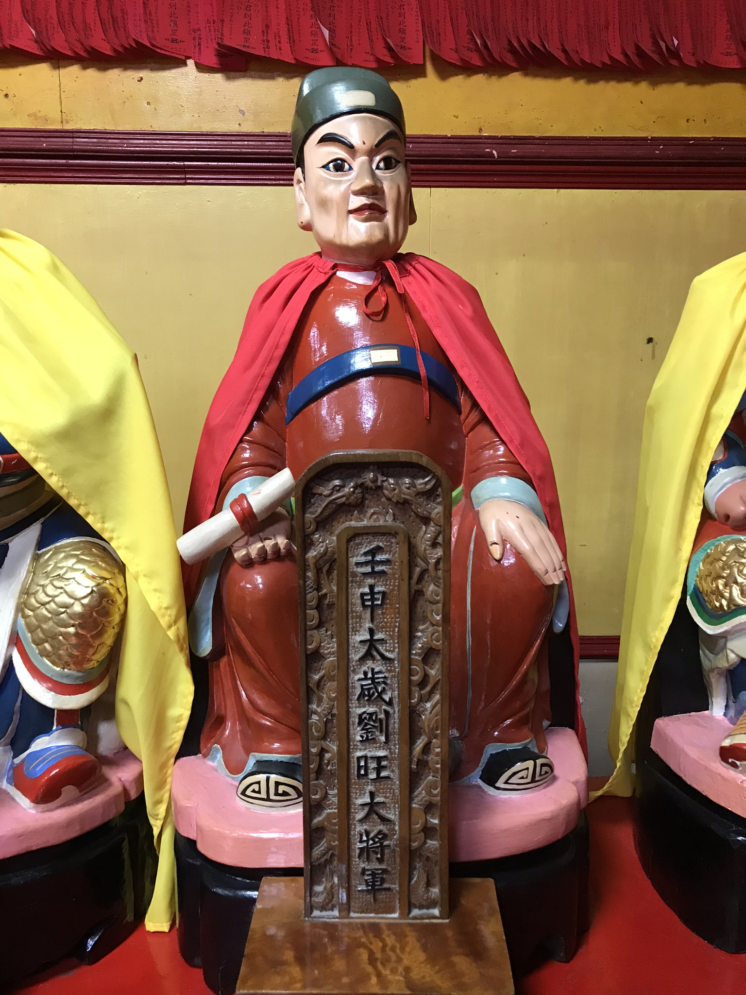 壬申太歲劉旺大將軍神像